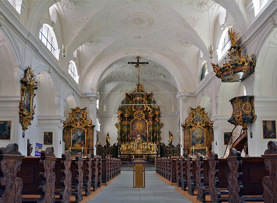 Inneres der Christuskirche St. Konrad in Konstanz